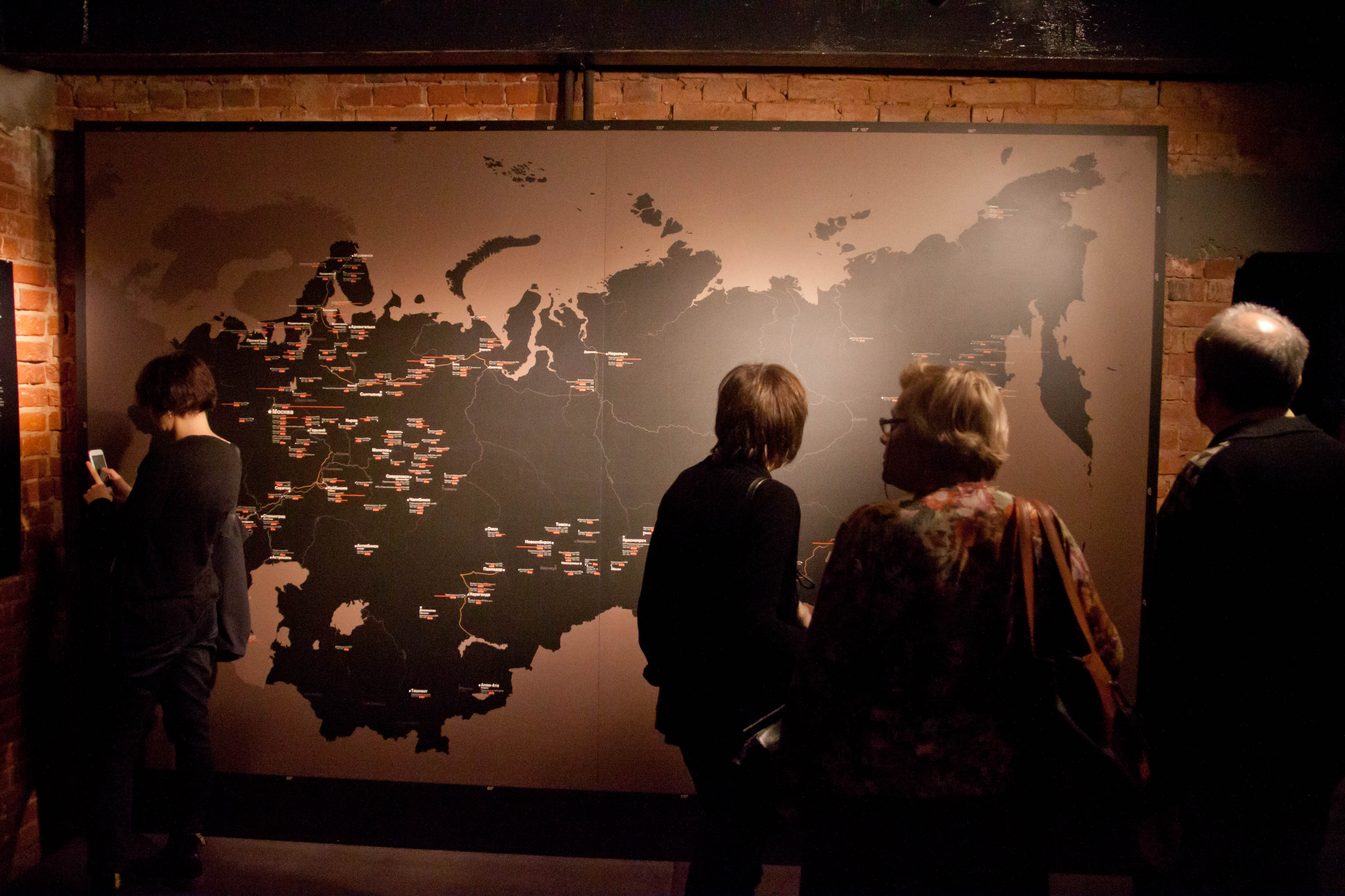 Экскурсия, концерт и фуршет в Музее истории ГУЛАГа 12 декабря 2017 года